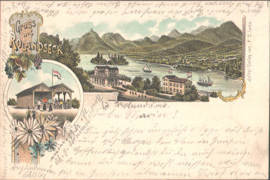 Ansichtskarte: Bahnhof Rolandseck und Hotel Billau, gelaufen 1899